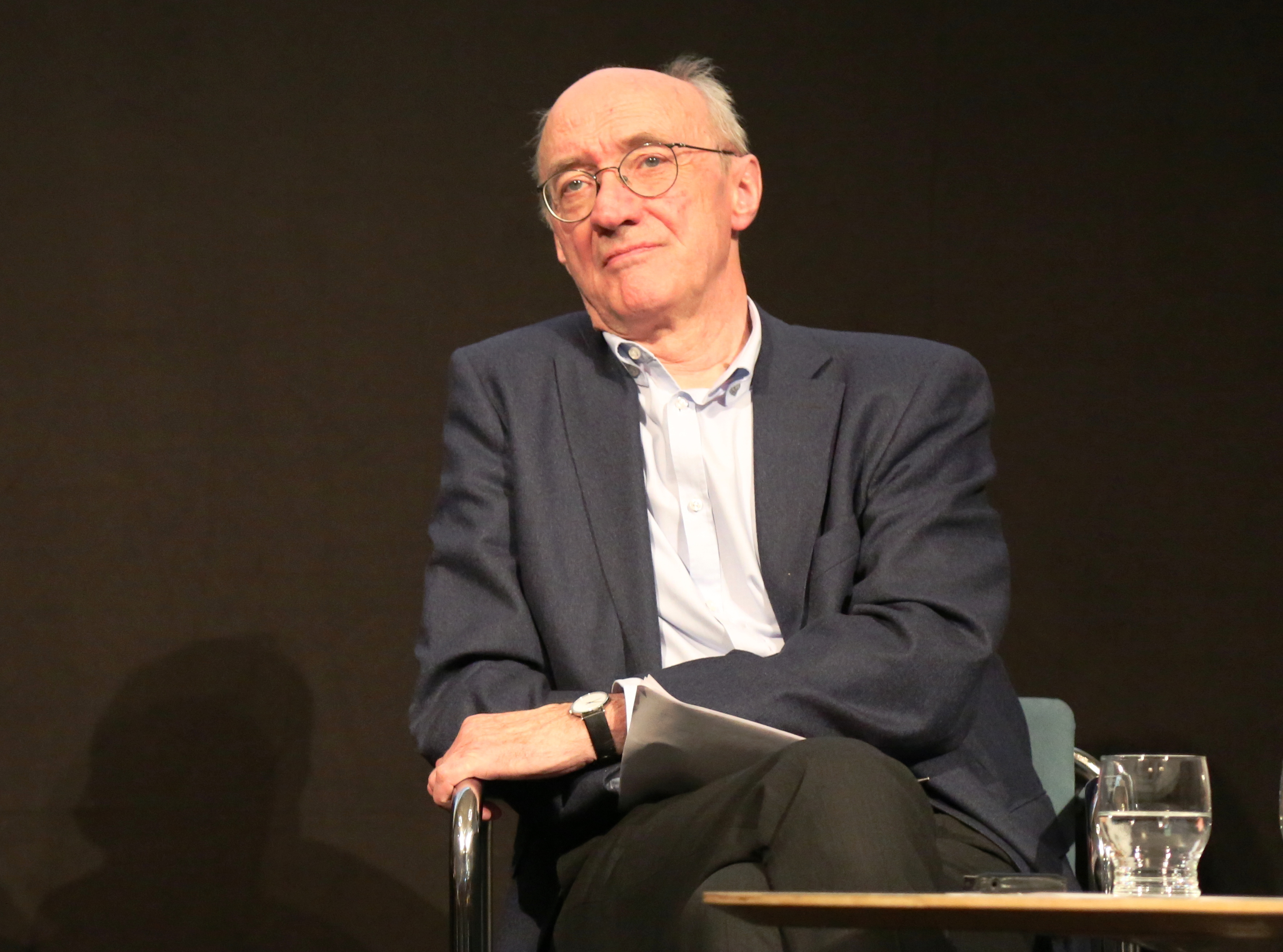 Winfried Nerdinger, Direktor des NS-Dokumentationszentrums München, Architekt, Professor an der Technischen Universität München, Mitglied der Bayerischen Akademie der Schönen Künste